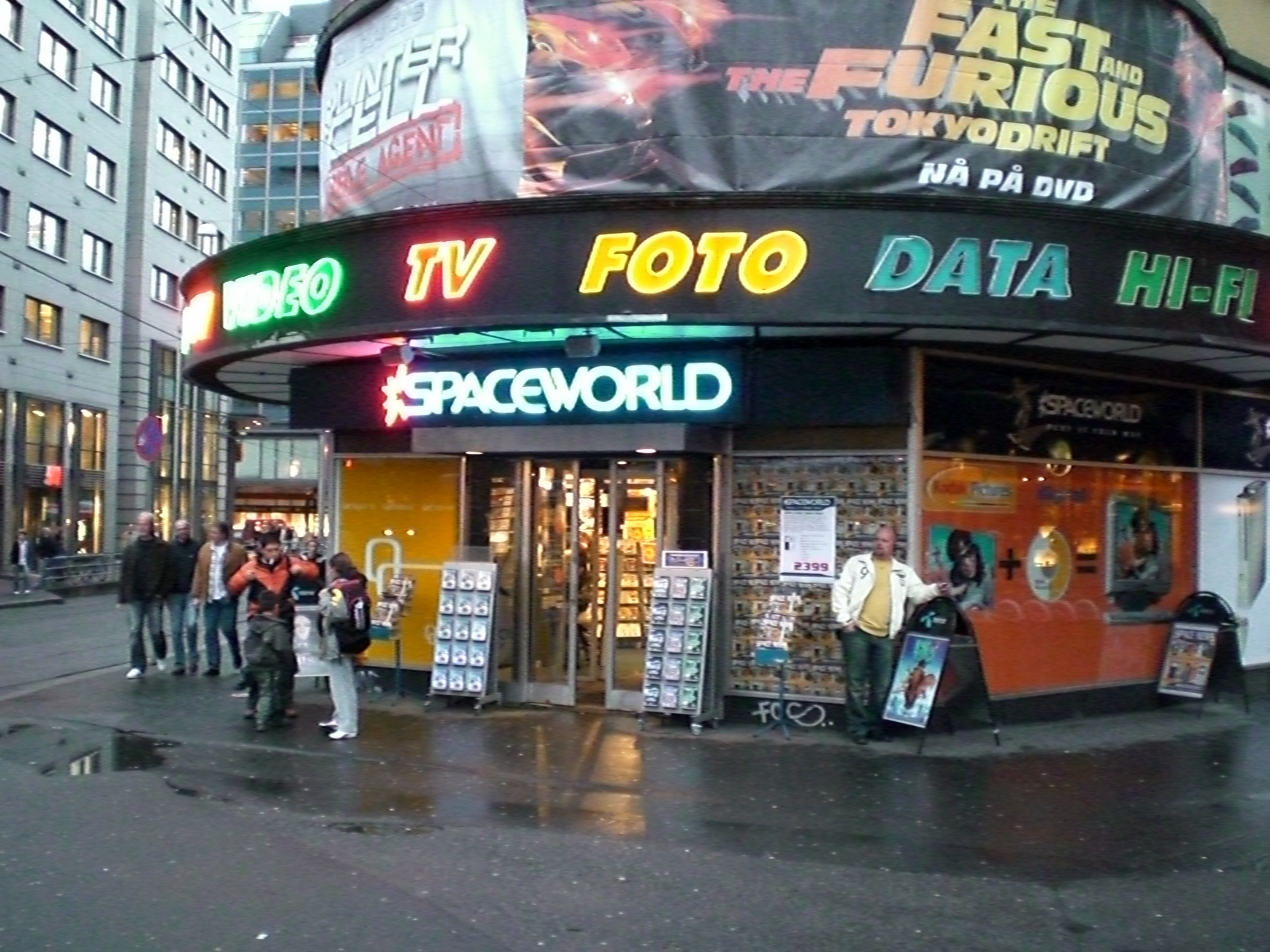 Spaceworld i Storgata i Oslo